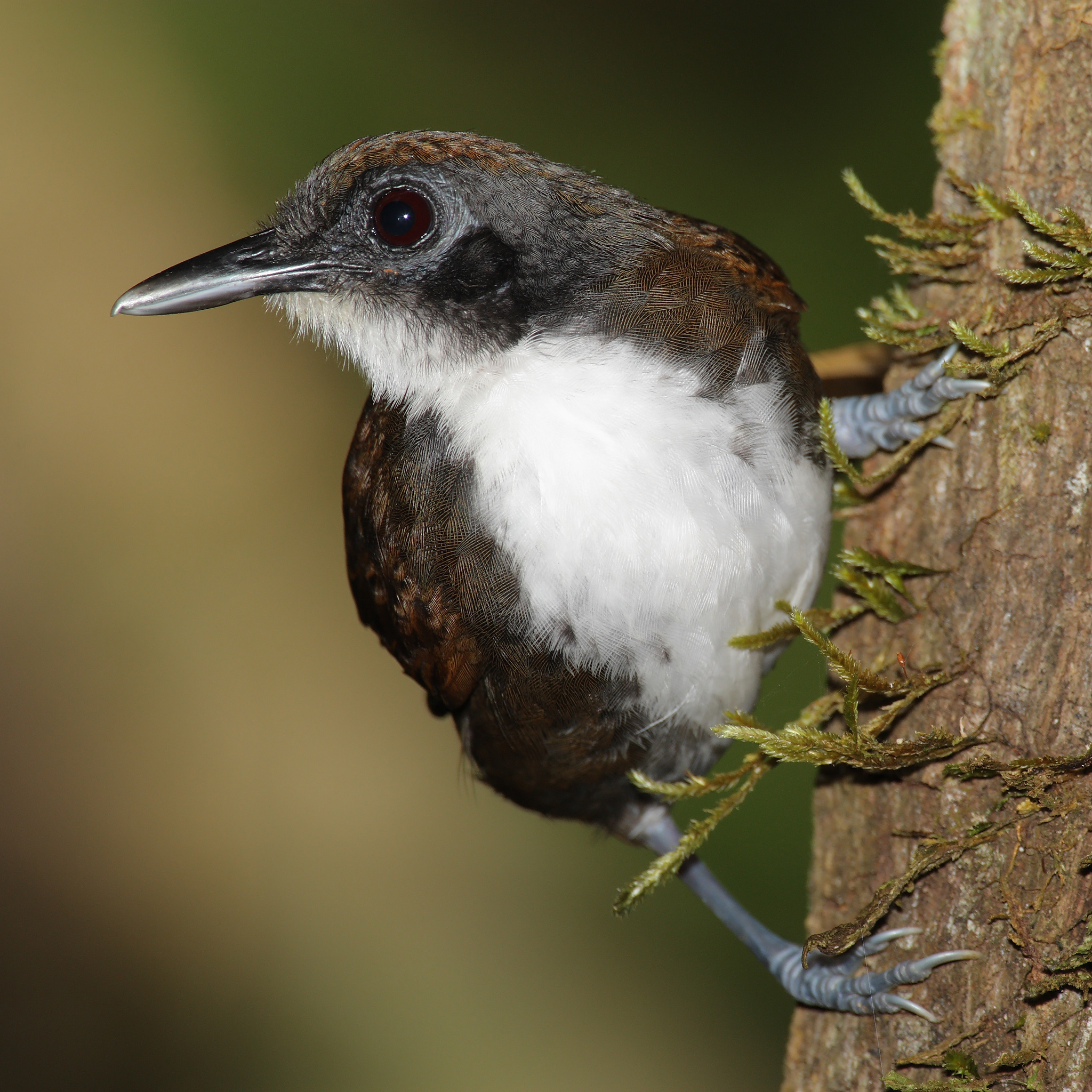 Bicolored Antbird -- Parque Nacional Darién, Panama -- 2008 February